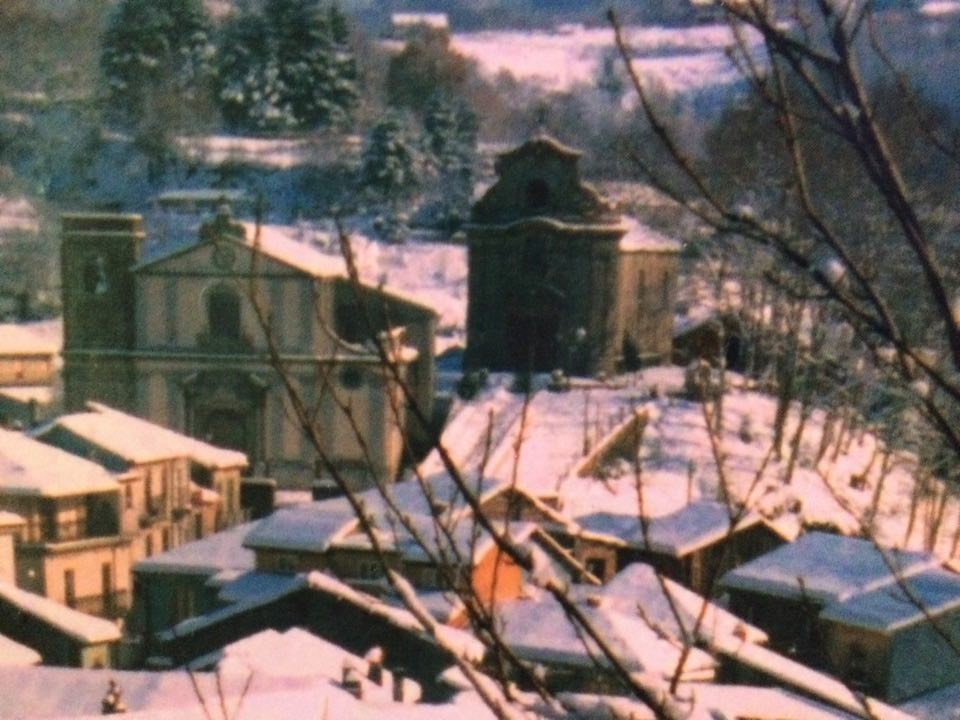 colle minerva